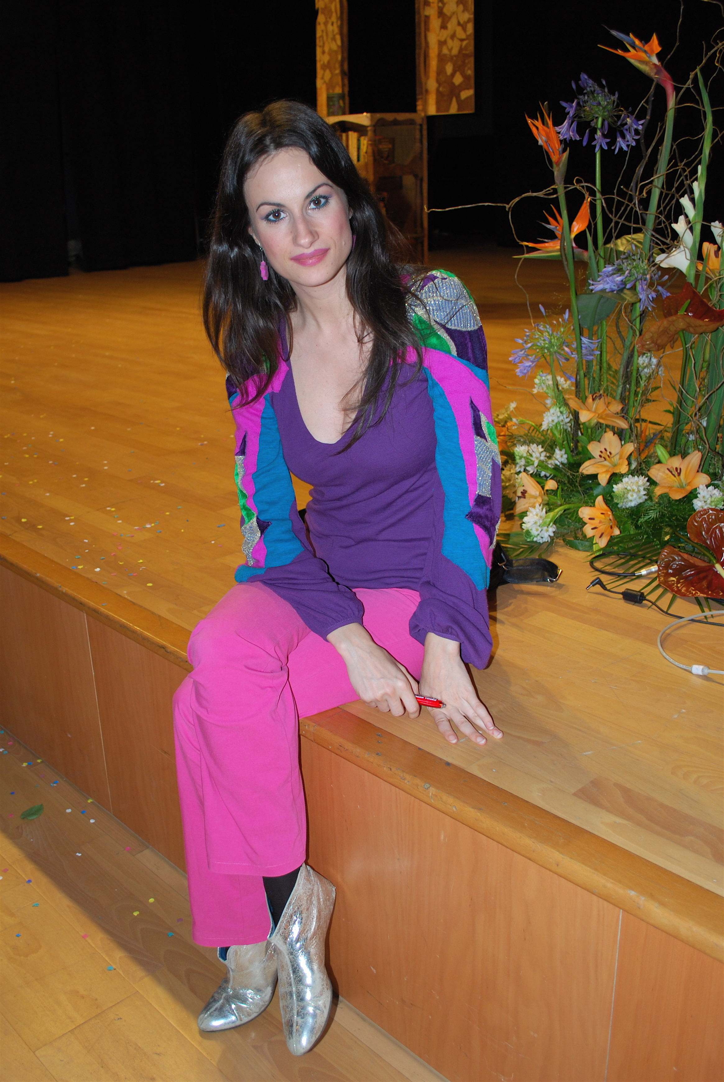 A escritora Yolanda Castaño en 2010.